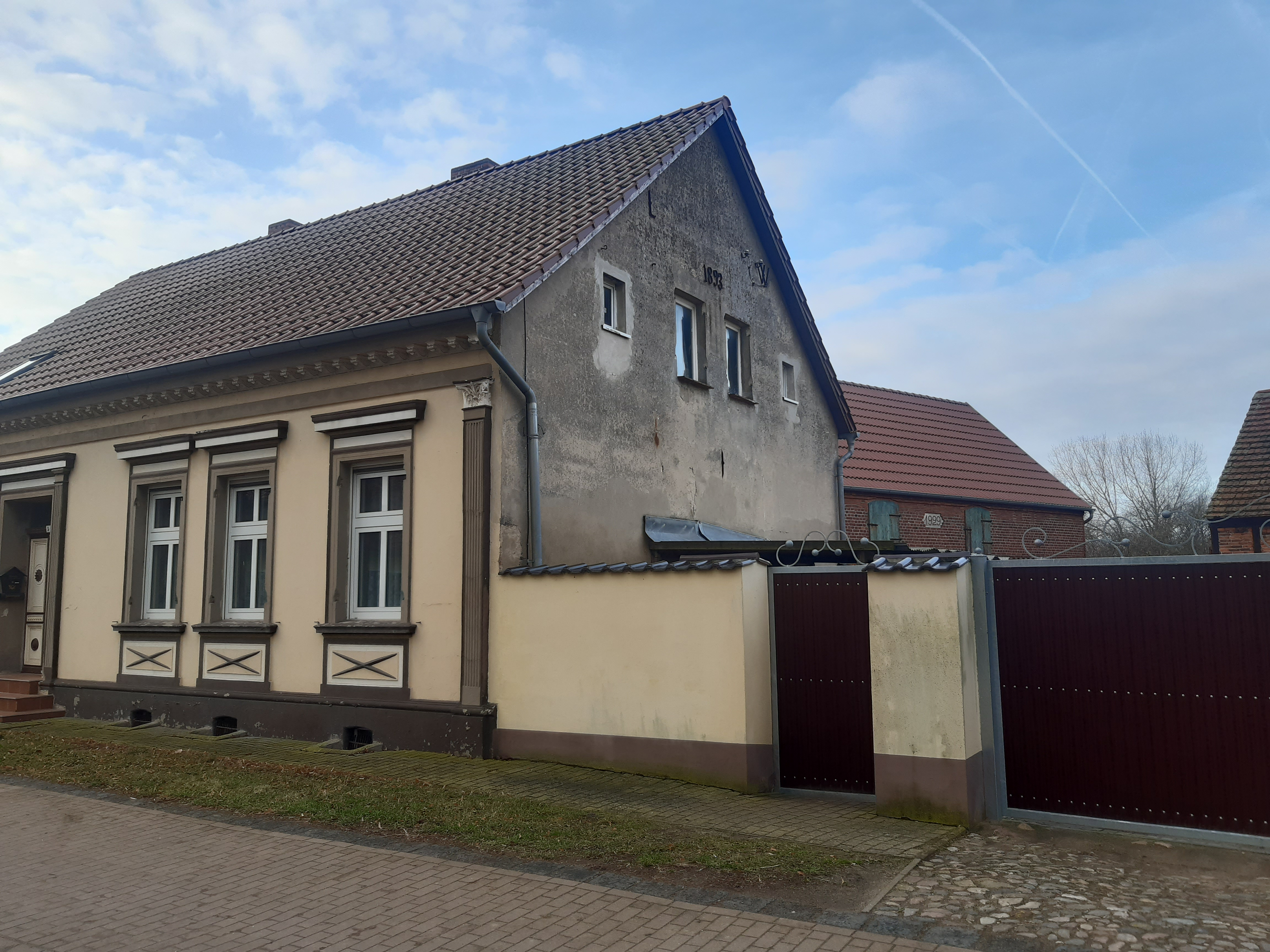 Bauernhof